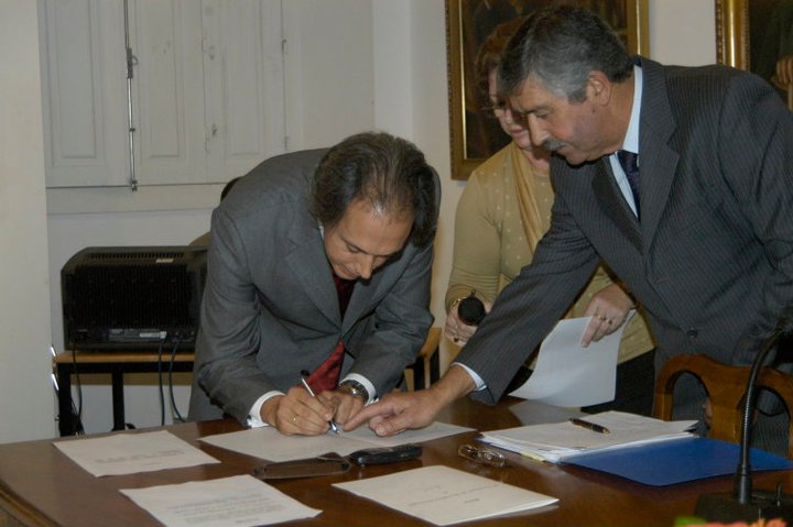 Luís Miguel Franco - tomada de posse como Presidente da Câmara Municipal de Alcochete